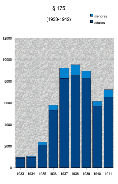 Condenados por el §175 durante la II Guerra Mundial Azul oscuro: adultos Azul claro: menores (de 18 años) En 1940 y 41 se han añadido los condenados en tribunales militares